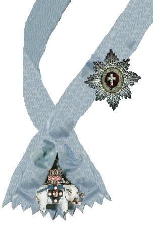 eigen tekening.